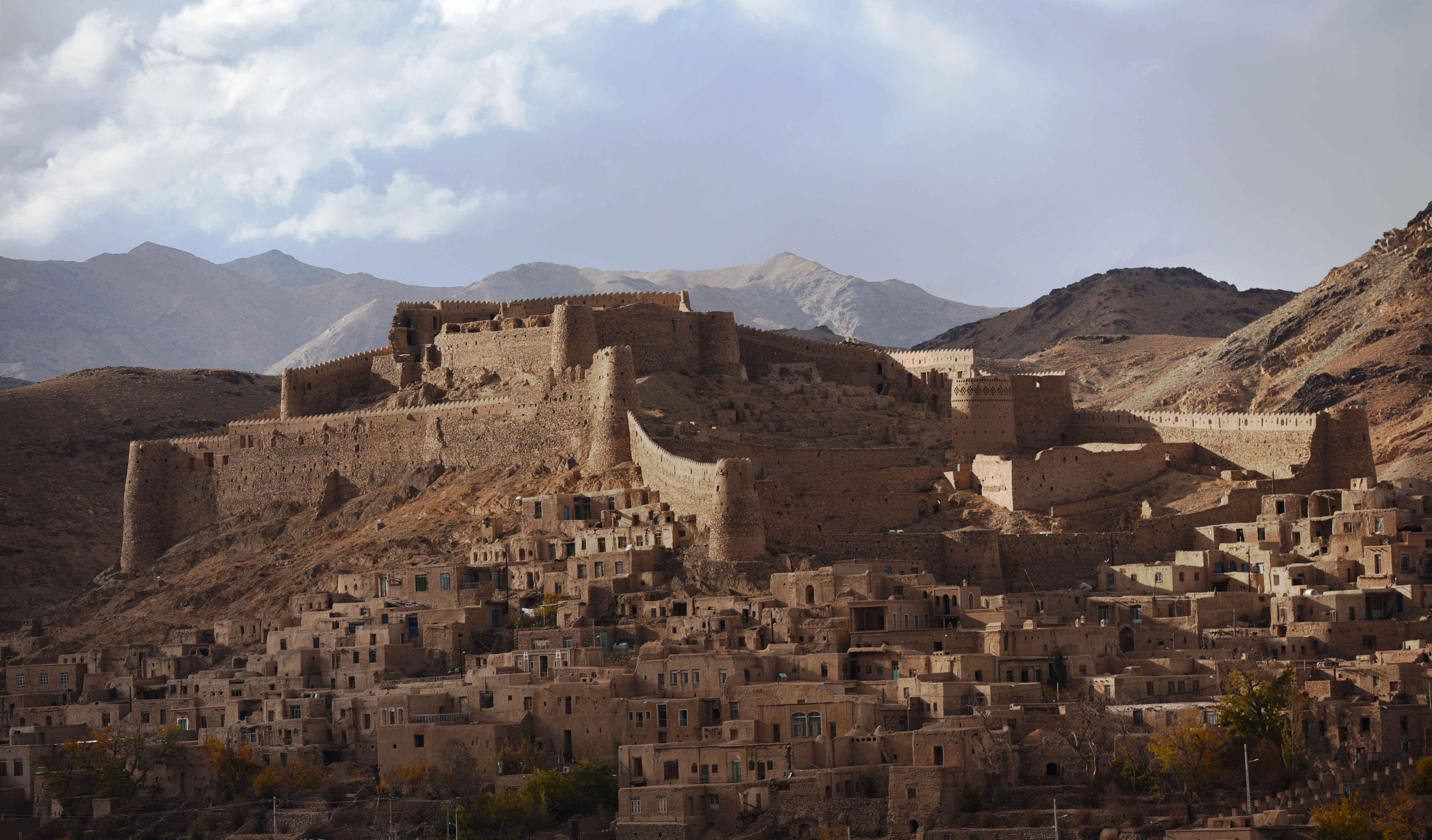 قلعه ميرزا رفيع خان واقع در روستاي فورگ